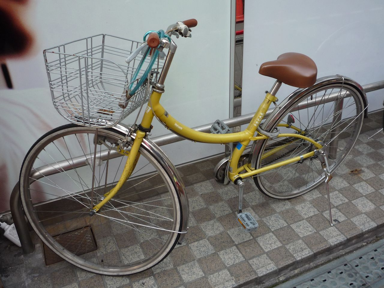 日本のシティサイクル（ファッションサイクル）